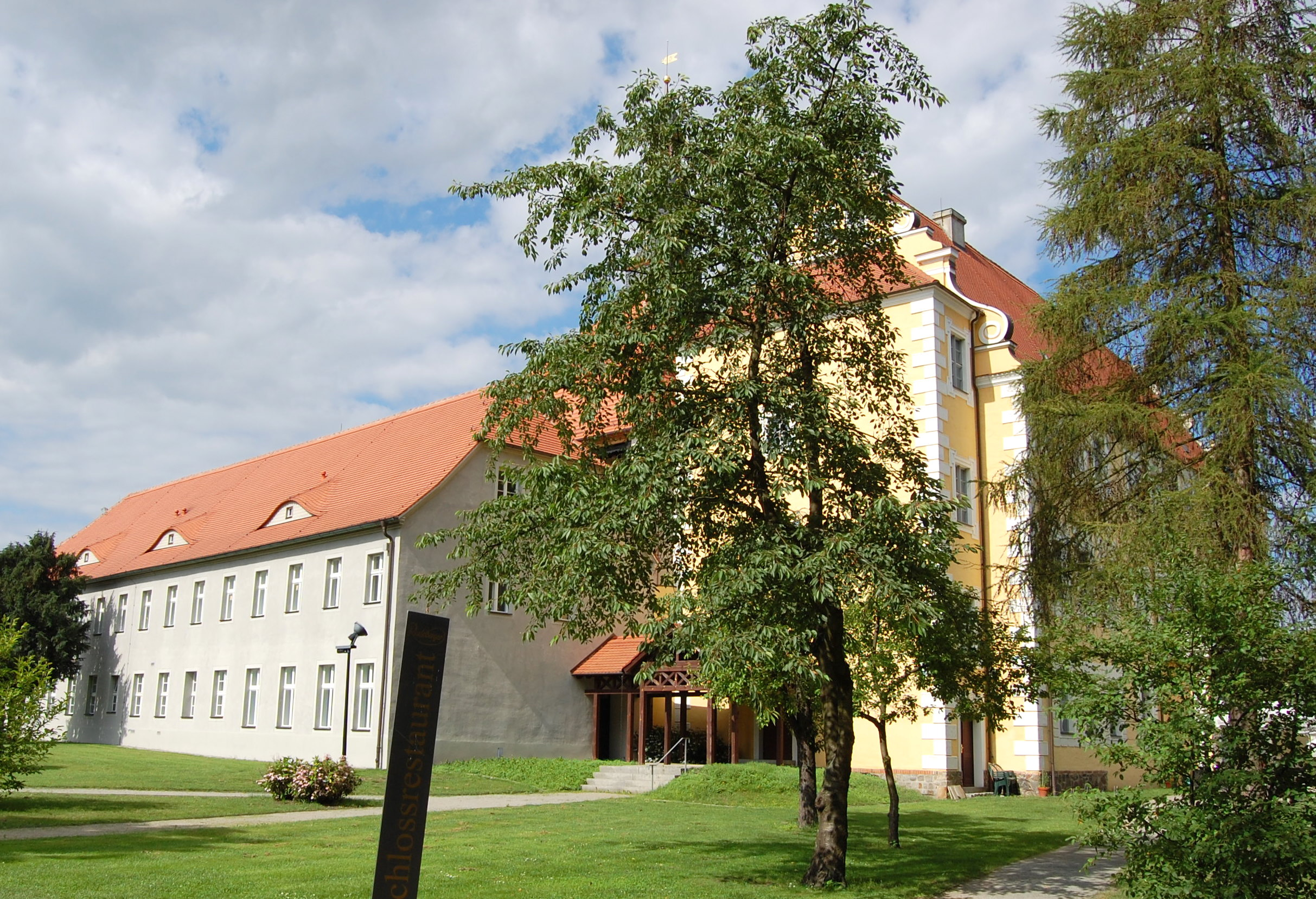 Schloss Lübben